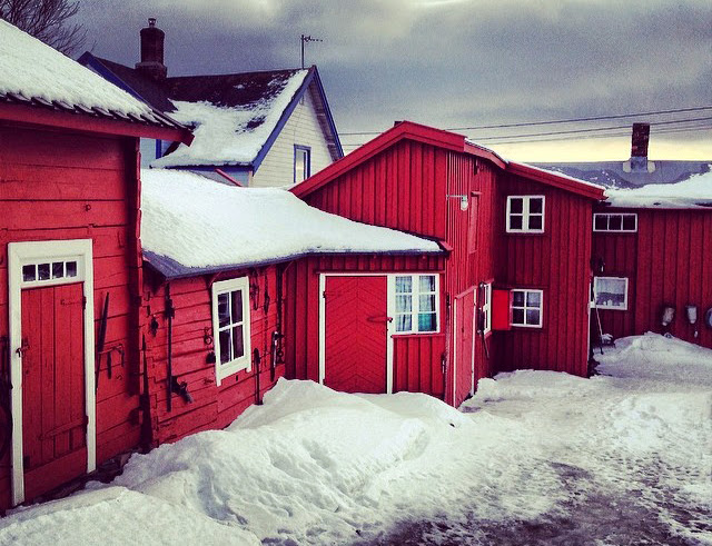 Tuomainengården i vinterdrakt